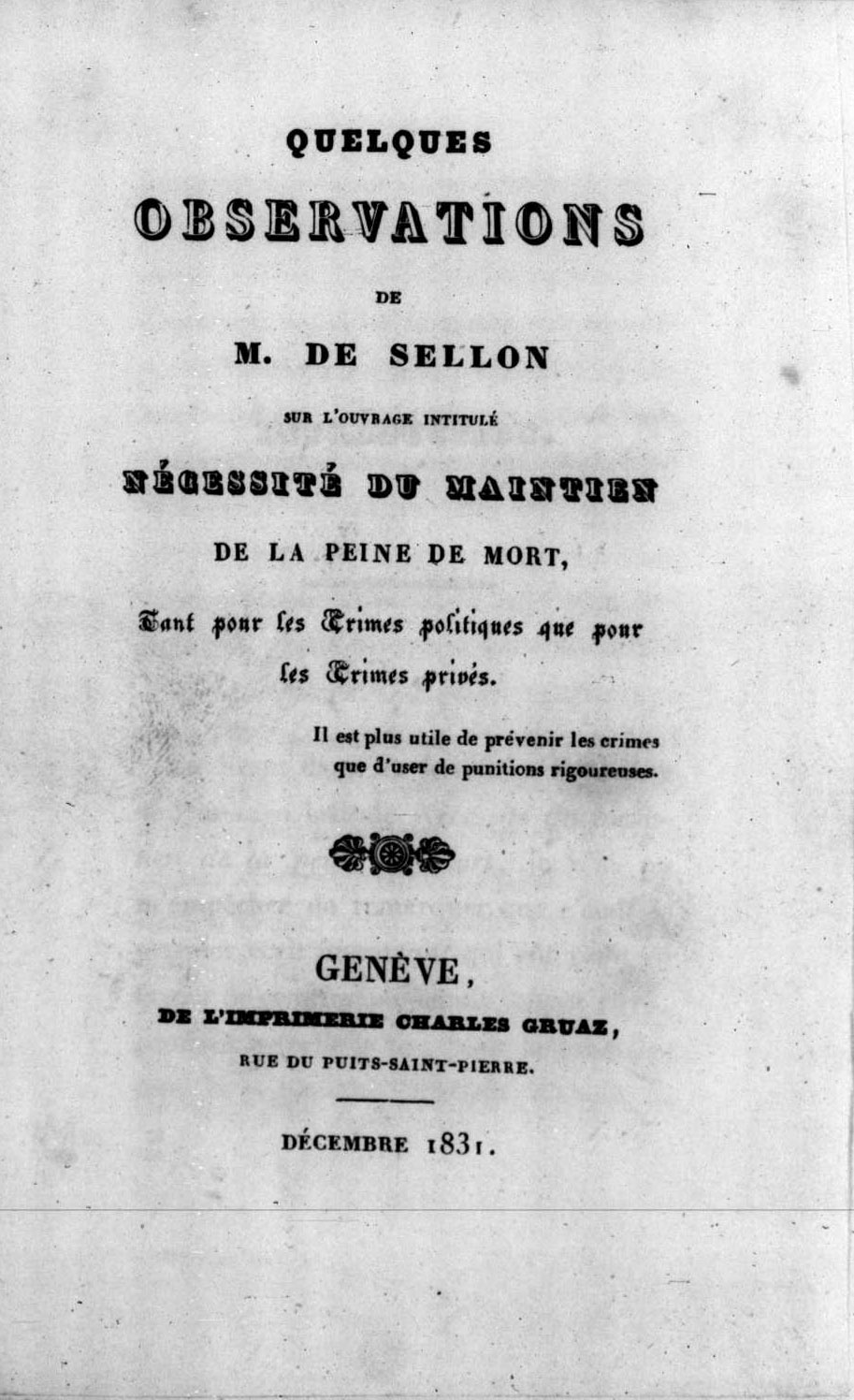 Frontespizio